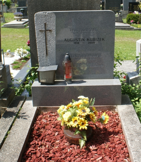 Friedhof Mauer-Augustin Kubizek